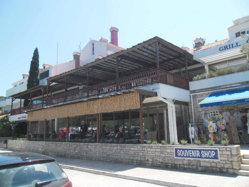 Hotel Odisej, Pomena, Mljet